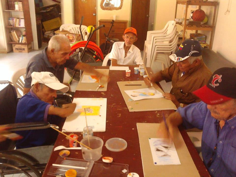 la foto se describe por si sola... y así es